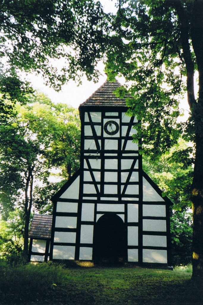 Kirche in Neu Temmen in der Schorfheide. Neu Temmen ist ein Ortsteil der Gemeinde Temmen-Ringenwalde im Brandenburgischen Landkreis Uckermark. Die Kirche stammt aus dem Jahre 1749. Sie ist ein rechteckiger Fachwerkbau mit querrechteckigem Westturm in Schiffsbreite. Sein Obergeschoss ist quadratisch. Die Inneneinrichtung - Kanzelaltar, Gestühl und Taufe - stammt ebenfalls aus dem 18. Jahrhundert. Quelle: Die Bau- und Kunstdenkmale in der DDR / Hrsg. vom Institut für Denkmalpflege, Band 4: Bezirk Neubrandenburg - Henschelverl. Kunst und Gesellschaft - Berlin 1986 53°5′12″N 13°46′35″E / 53.08667°N 13.77639°E